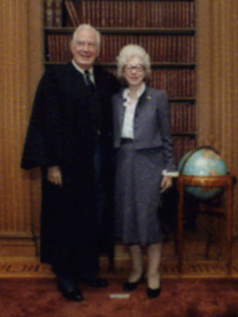 Warren and Elvera Burger